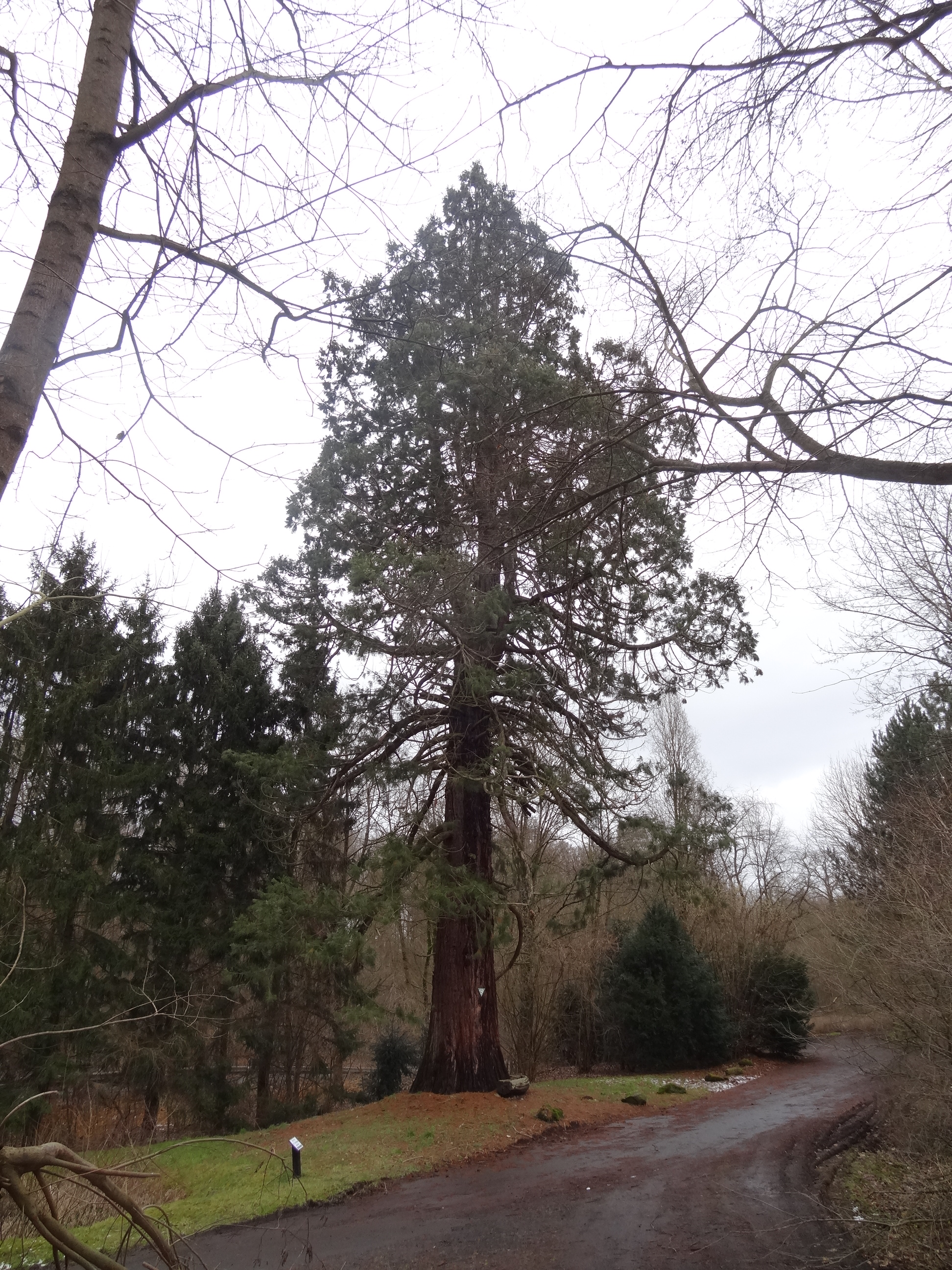 Mammutbaum am ehem. Forsthaus, Harb/Nidda